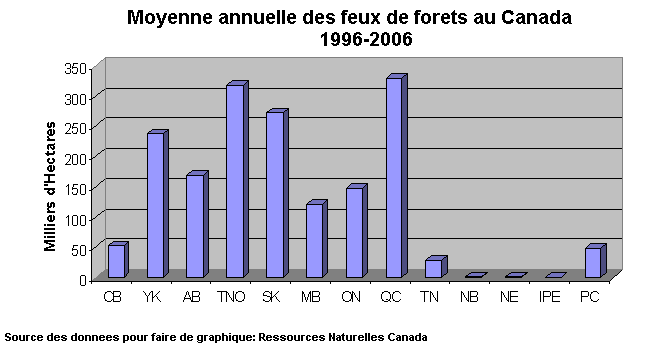 Distribution selon la province des feux de forets au Canada selon la moyenne annuelle de 1996-2006. (CB: Colombie britannique, AB: Alberta, SK: Saskatchewan, MB:Manitoba, ON:Ontario, QC:Quebec, IPE:Ile-du-Prince-Edouard, NB:Nouveau-Brunswick, NE:Nouvelle-Ecosse, TN: Terre-Neuve-et-Labrador, TNO:Territoires-du-Nord-Ouest, YK:Yukon, PC:Parcs Canada)